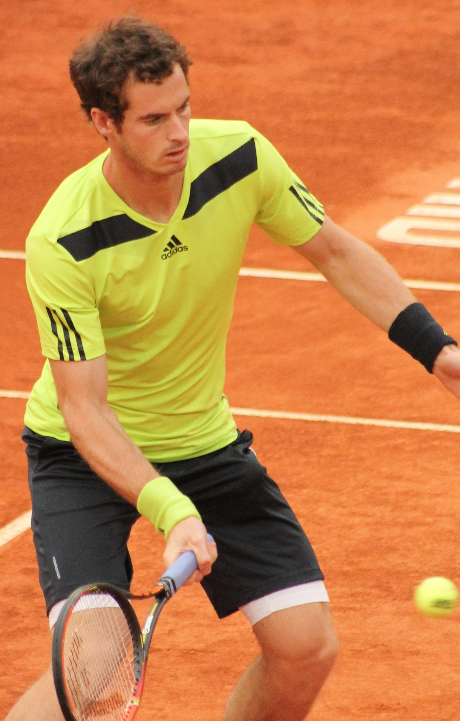 Murray A. MA14 (18)